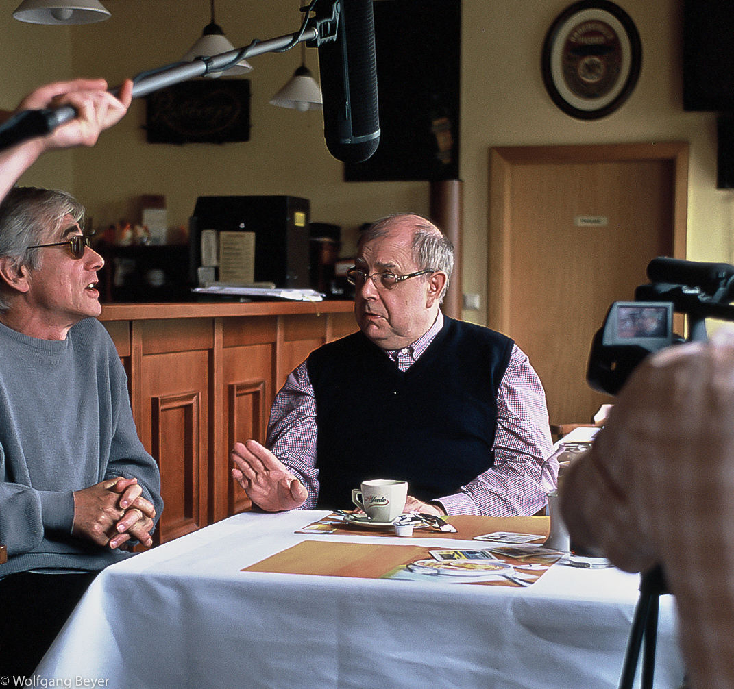 Christian Pulz und Eduard Stapel im Interview mit den beiden Filmemachern Jochen Hick und Andreas Strohfeldt